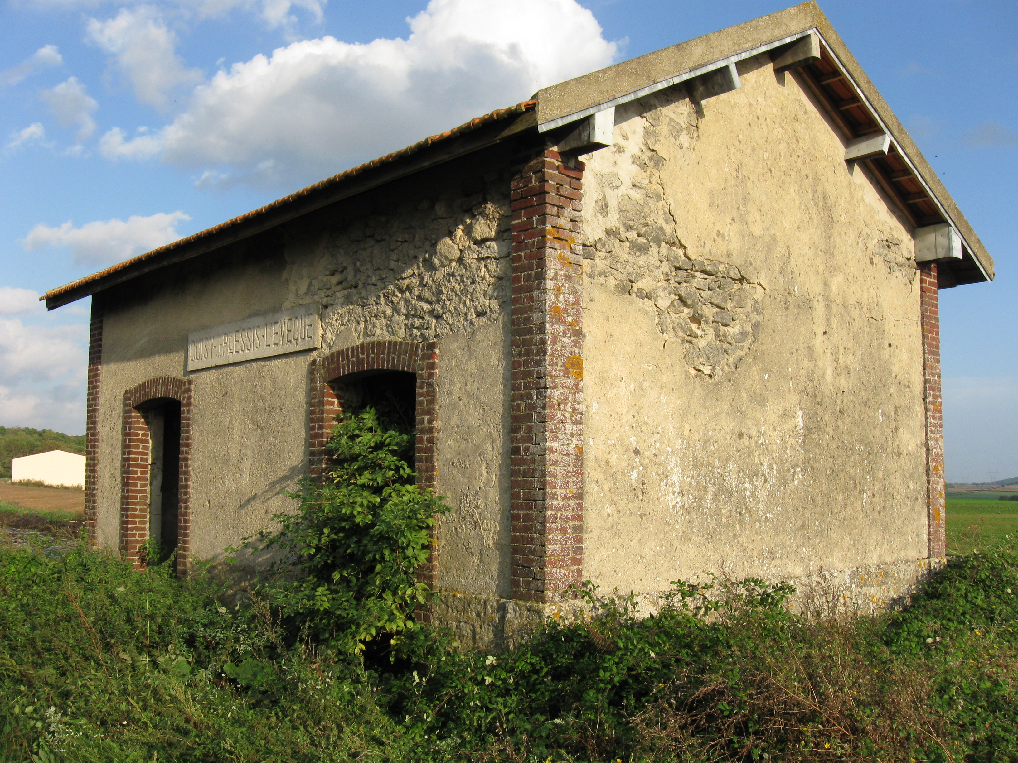 L'ancienne gare de Cuisy - Le Plessis-l'Évêque du tramway de Meaux à Dammartin. (Seine-et-Marne, région Île-de-France).